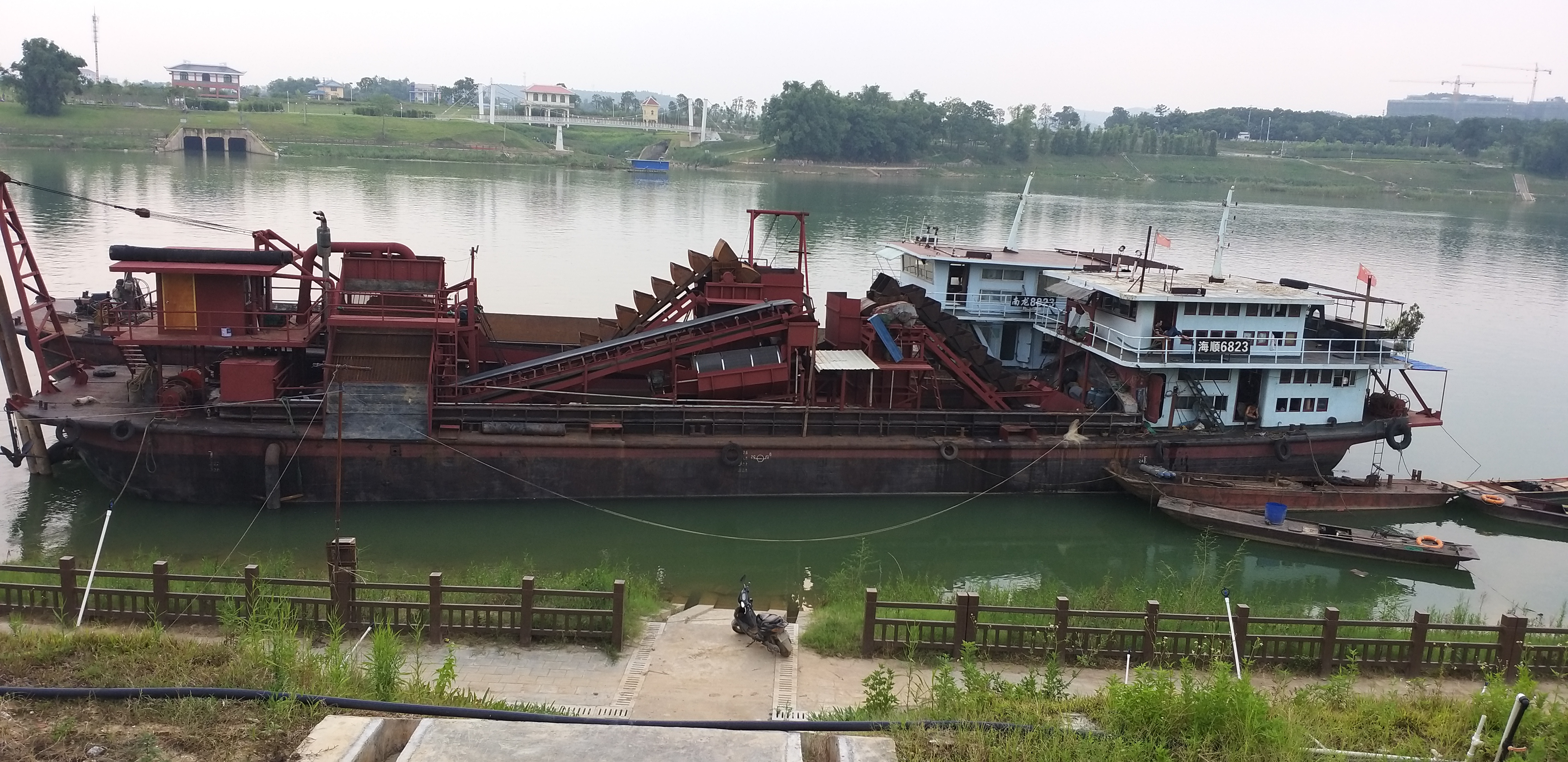 广西南宁邕江边上的货船 中文（中国大陆）: 广西南宁邕江边上的货船